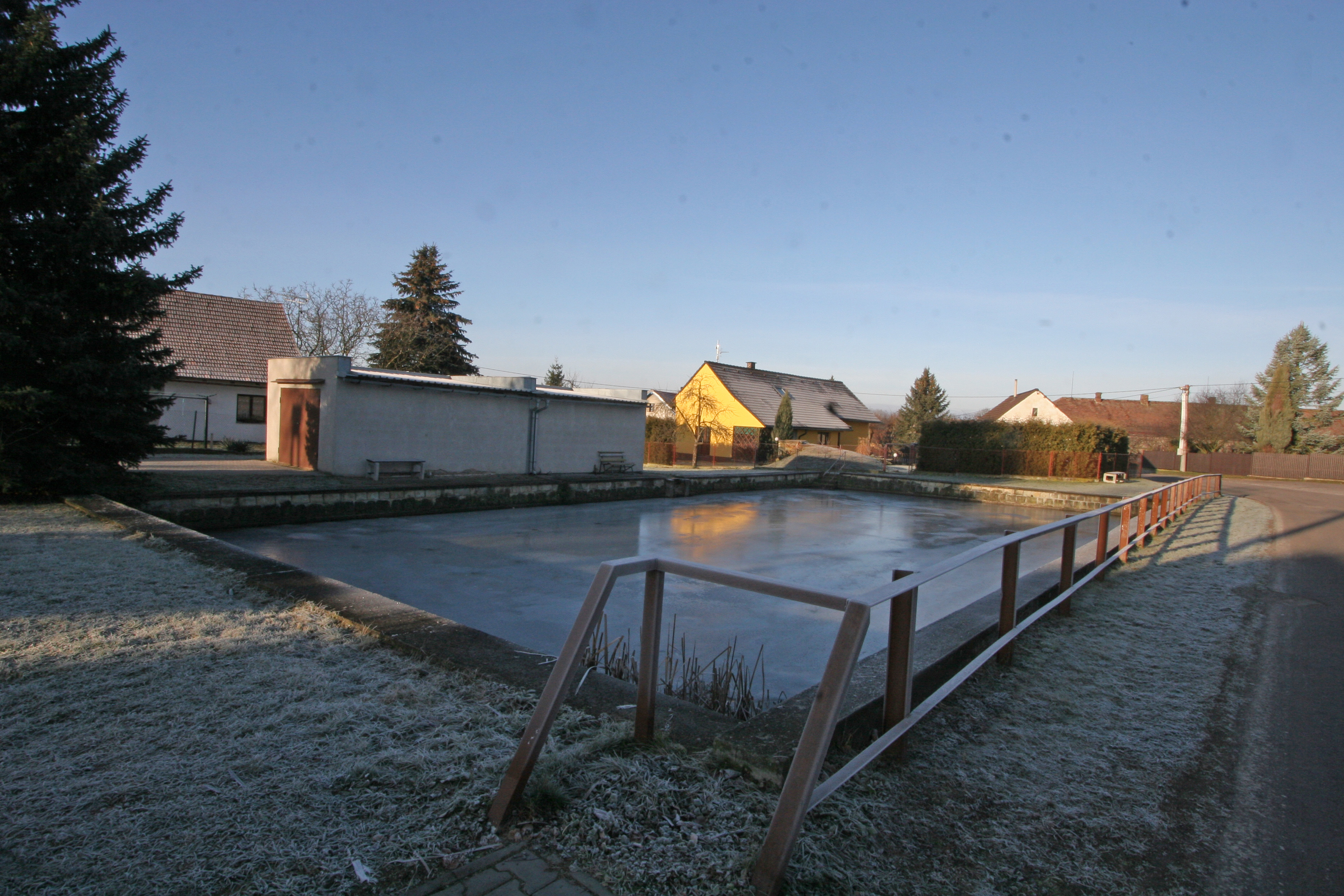 Pravy požární nádrž